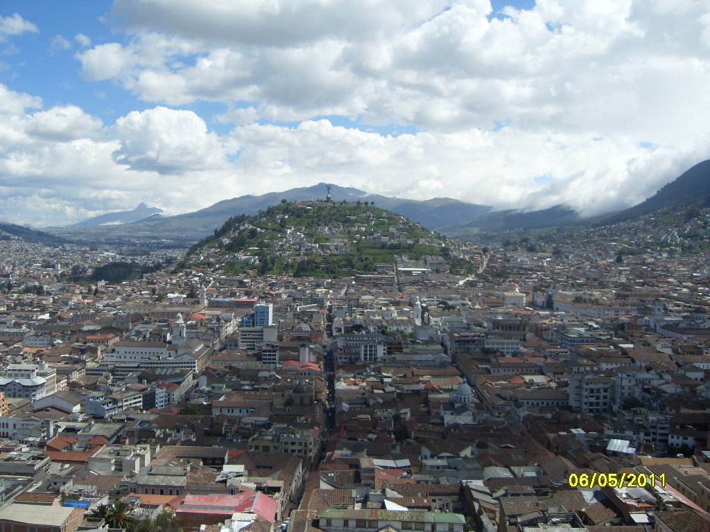 Vista Panoramica del Centro Historico de Quito